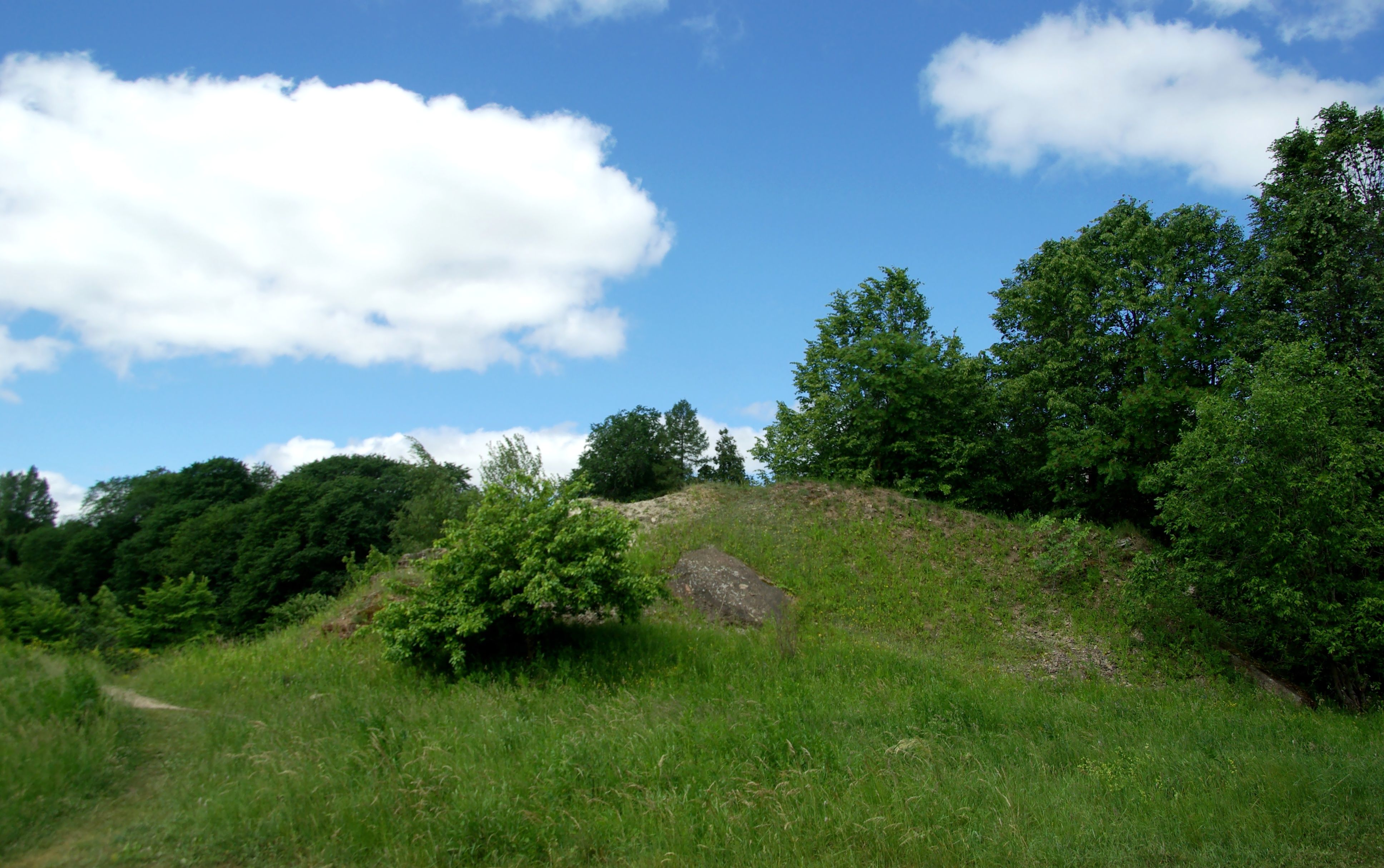 Kiviaja asulakoht